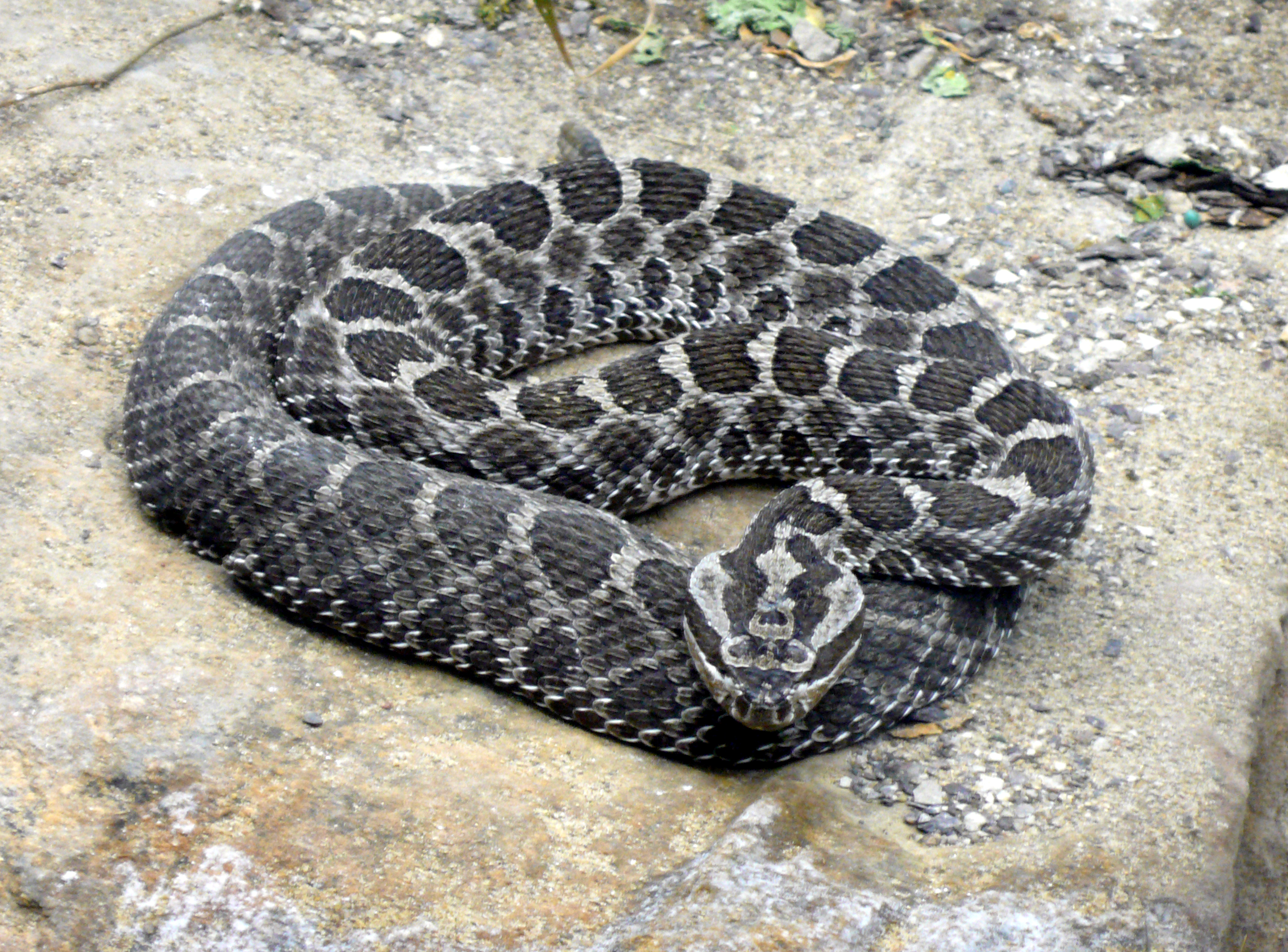 Massasauga rattlesnake (Sistrurus catenatus)